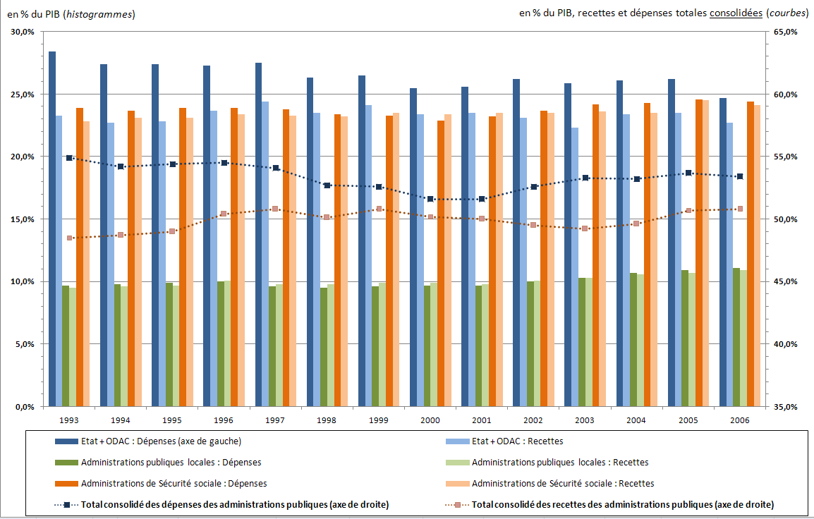 Dépenses et recettes publiques, en France, entre 1993 et 2006, ventilées selon les administrations publiques. Les dépenses et recetes totales sont consolidées (i.e. les transferts entre administrations publiques ont été pris en compte et simplifiés dans le calcul).